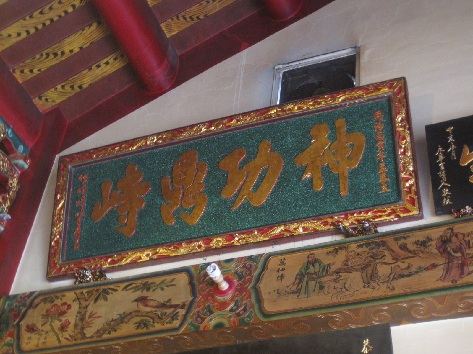 臺南開基三官廟「神功鼎峙」匾